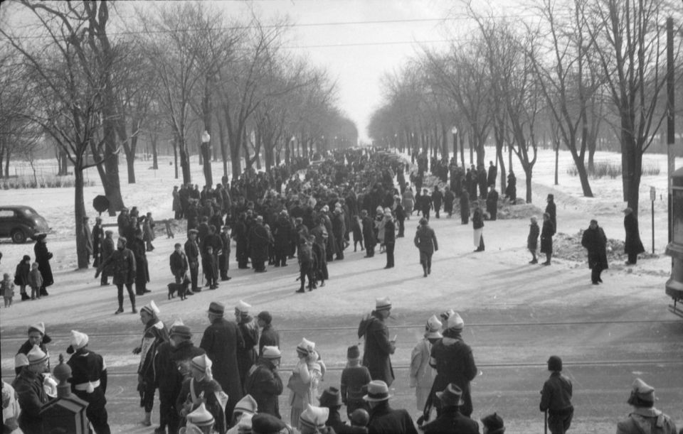 Nous voyons une foule rassemblée l'hiver au parc Lafontaine, parmi laquelle nous pouvons distinguer des raquetteurs en costume.